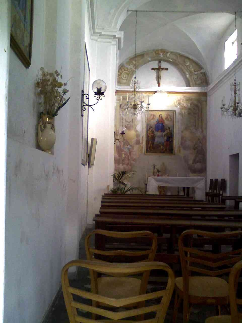 Interno cappella di San Sebastiano in Albisola Superiore (Italy)